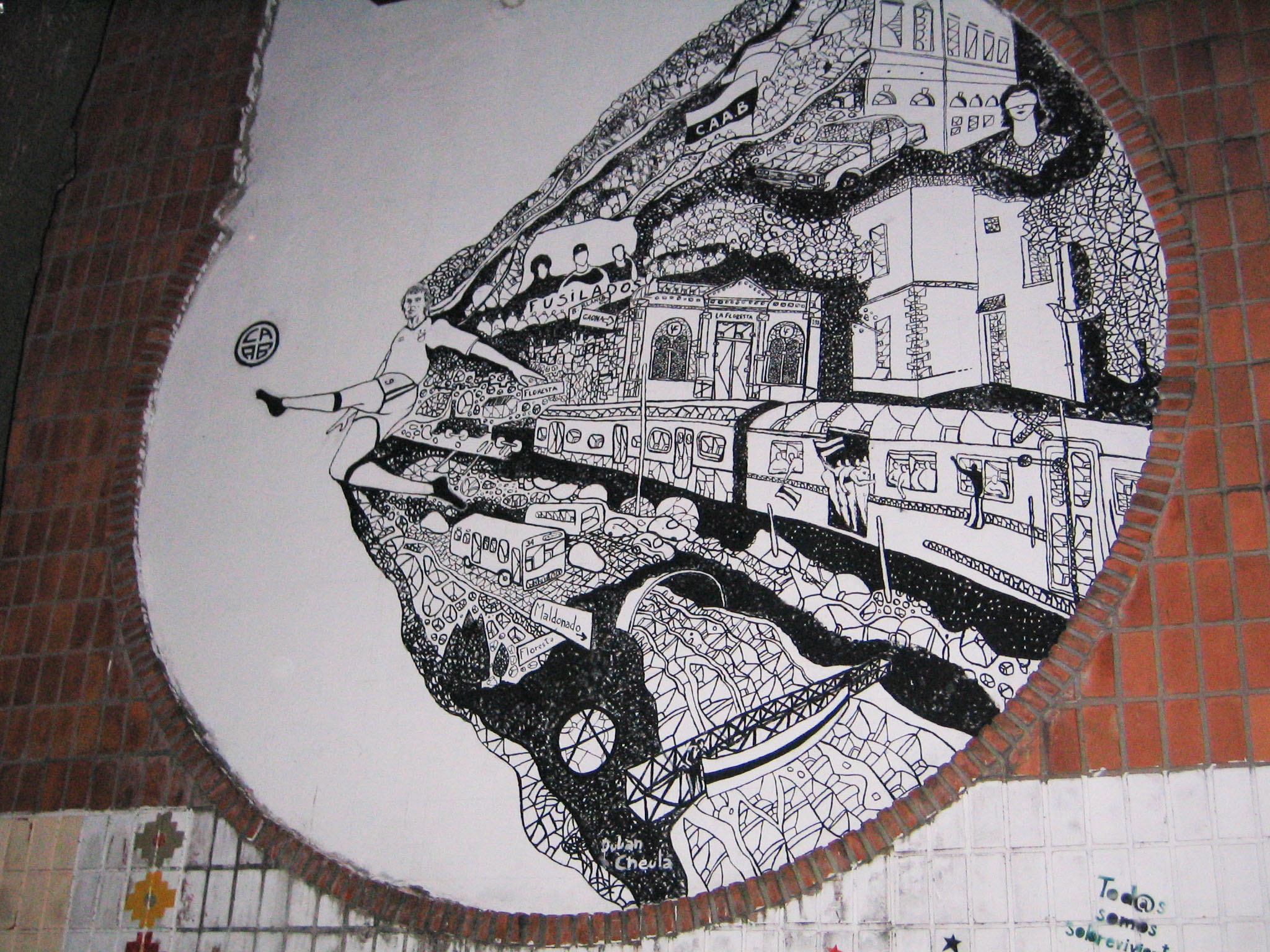 En la Plaza Che Guevara se encuentra el cuarto mural ganador del concurso Floresta, Historia y Pasión llamado "El Peso de la Camiseta" de Julián Cheula.